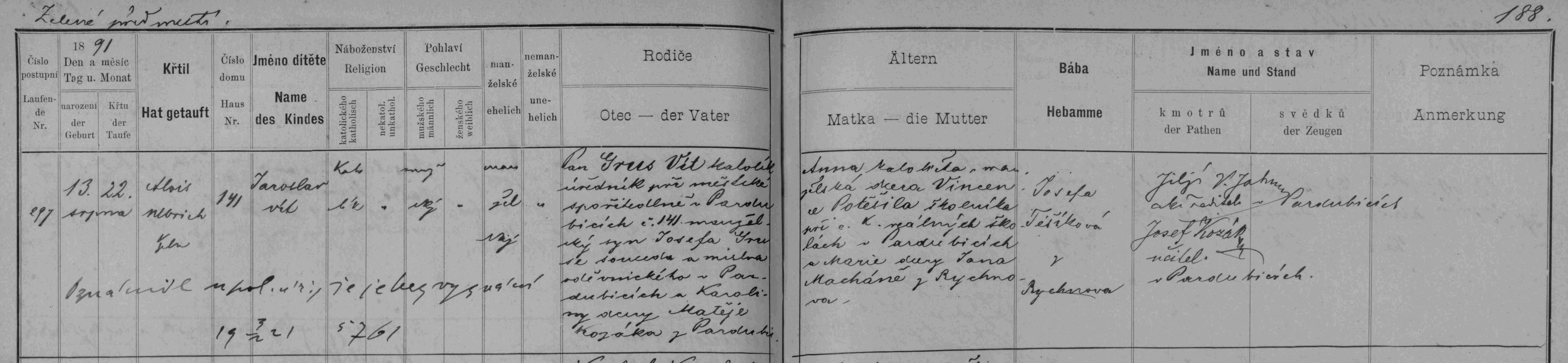 matriční zápis o narození a křtu Jaroslava Gruse (matrika N 1887-1892 Pardubice-Zelené Předměstí (SOA Zámrsk))